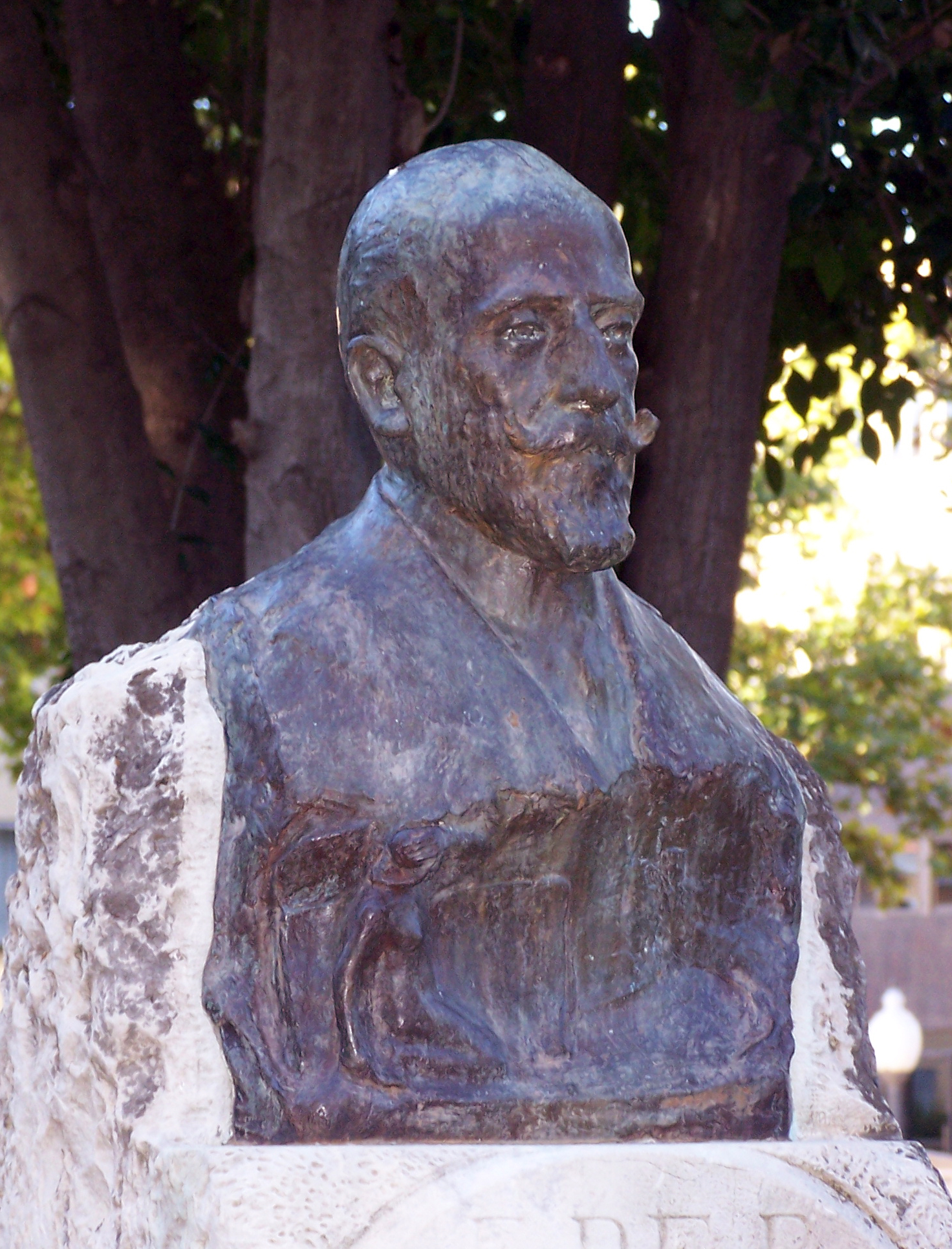 Busto de Francisco de Paula Valladar, realizado hacia 1924 por José María Palma Velasco, integrado en el monumento al periodista e historiador sito en los jardines de la Bomba de Granada